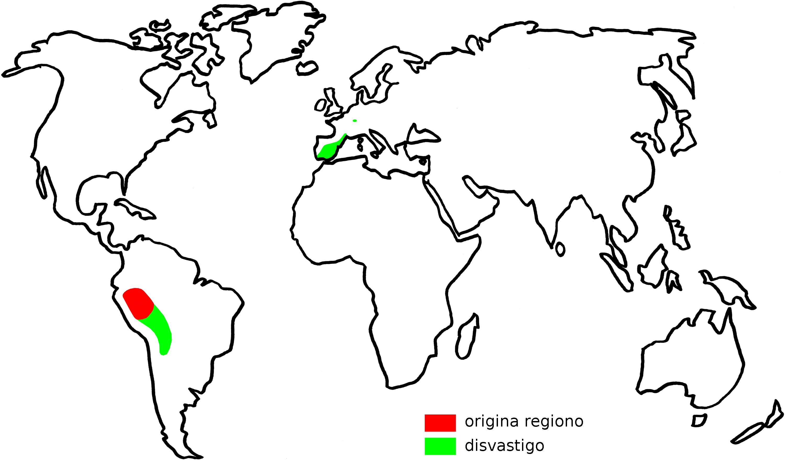 Disvastigo de kvinoo